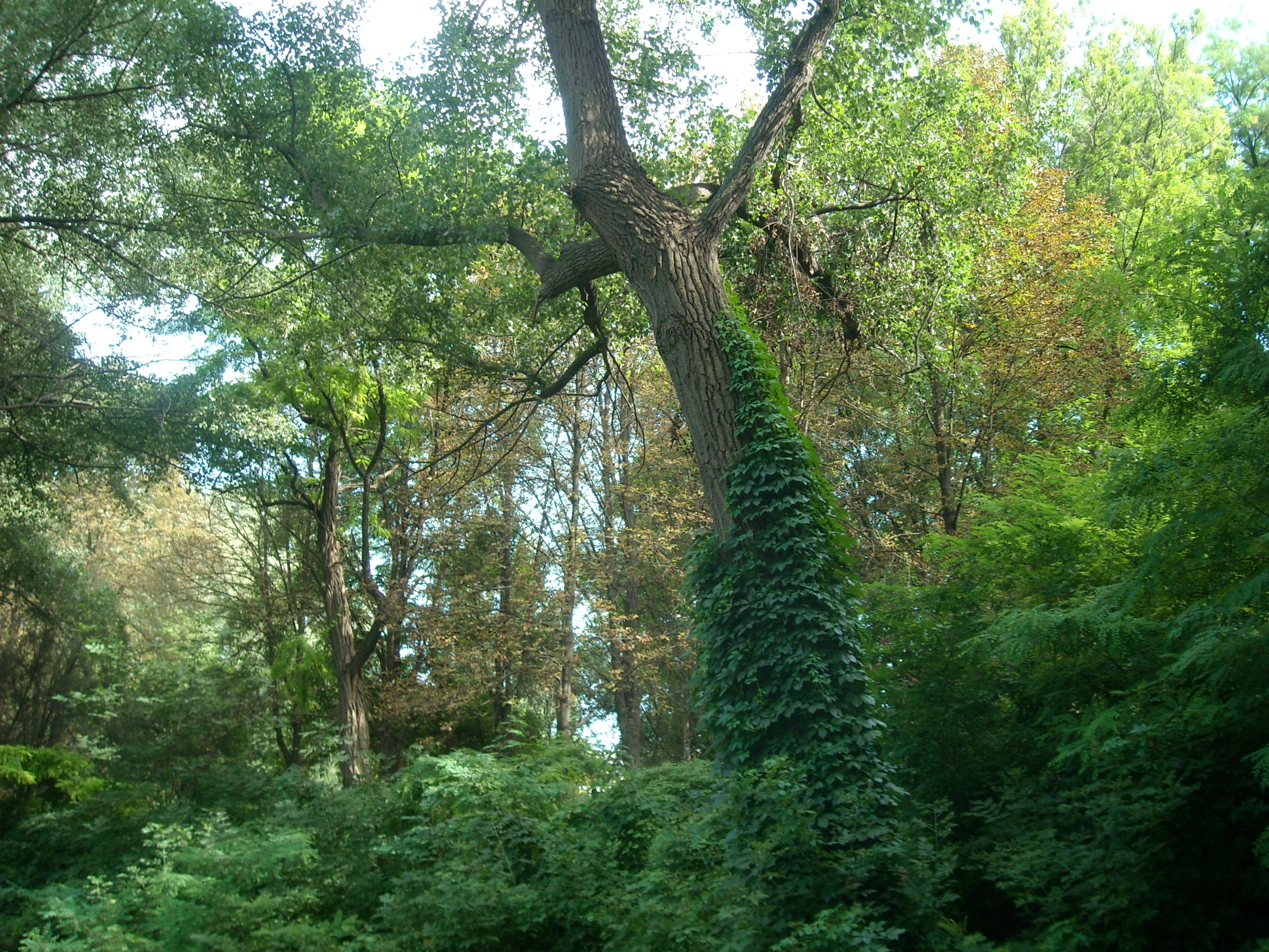 Парк возле ботанического сада.